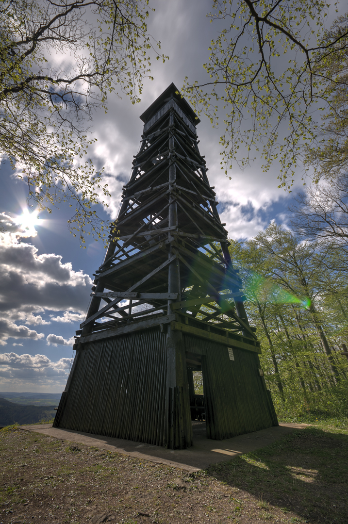 Plesseturm von Südost